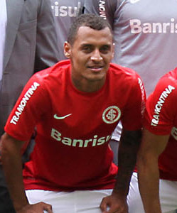 Visita da presidente Dilma Rousseff ao Beira-Rio (20 de fevereiro de 2014